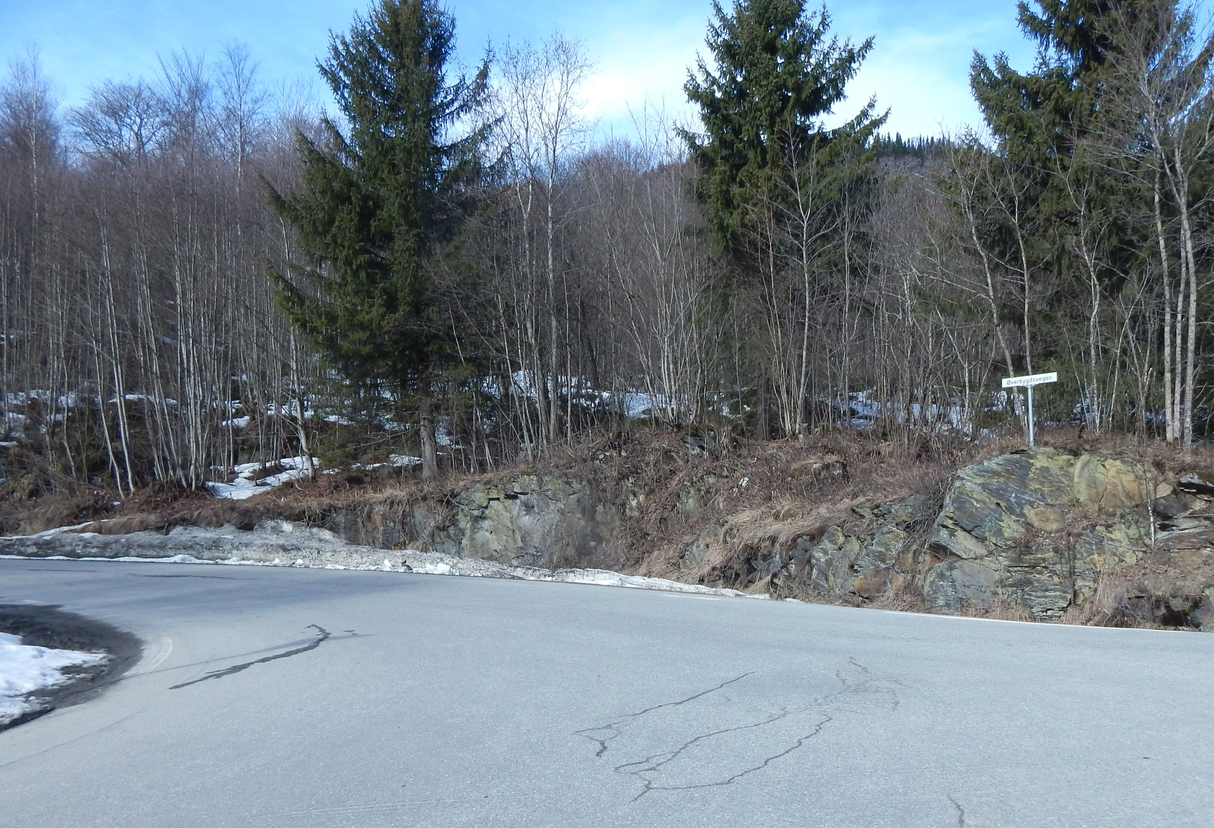 Øverbygdsvegen (fylkesvei 2530, tidl. 318)